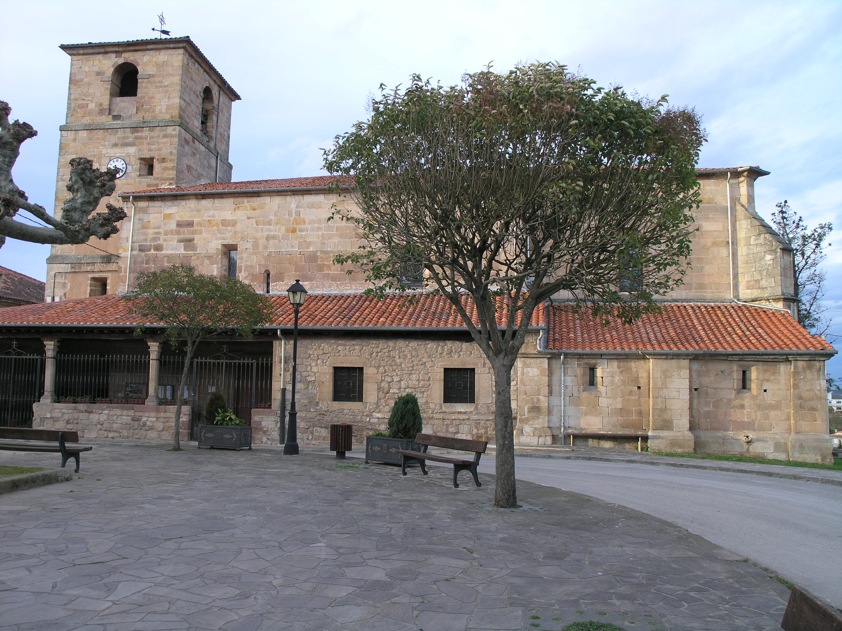 Iglesia de San Román, parroquial de Viérnoles, en el municipio de Torrelavega, Cantabria, España. De mediados del siglo XVI sobrevive la cabecera.